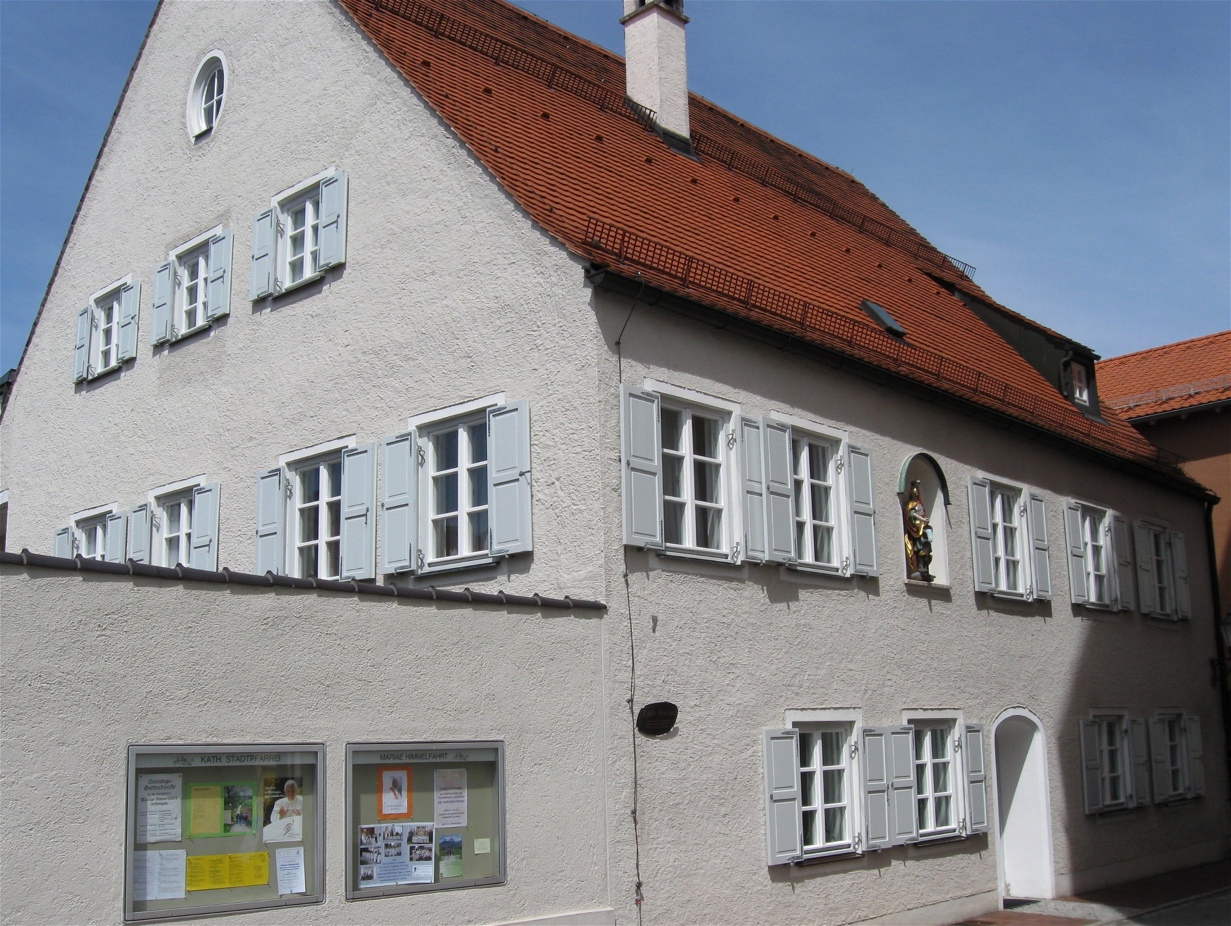 Kirchenstraße 7; Pfarrhaus; zweigeschossiger Satteldachbau, im Kern 18. Jh.